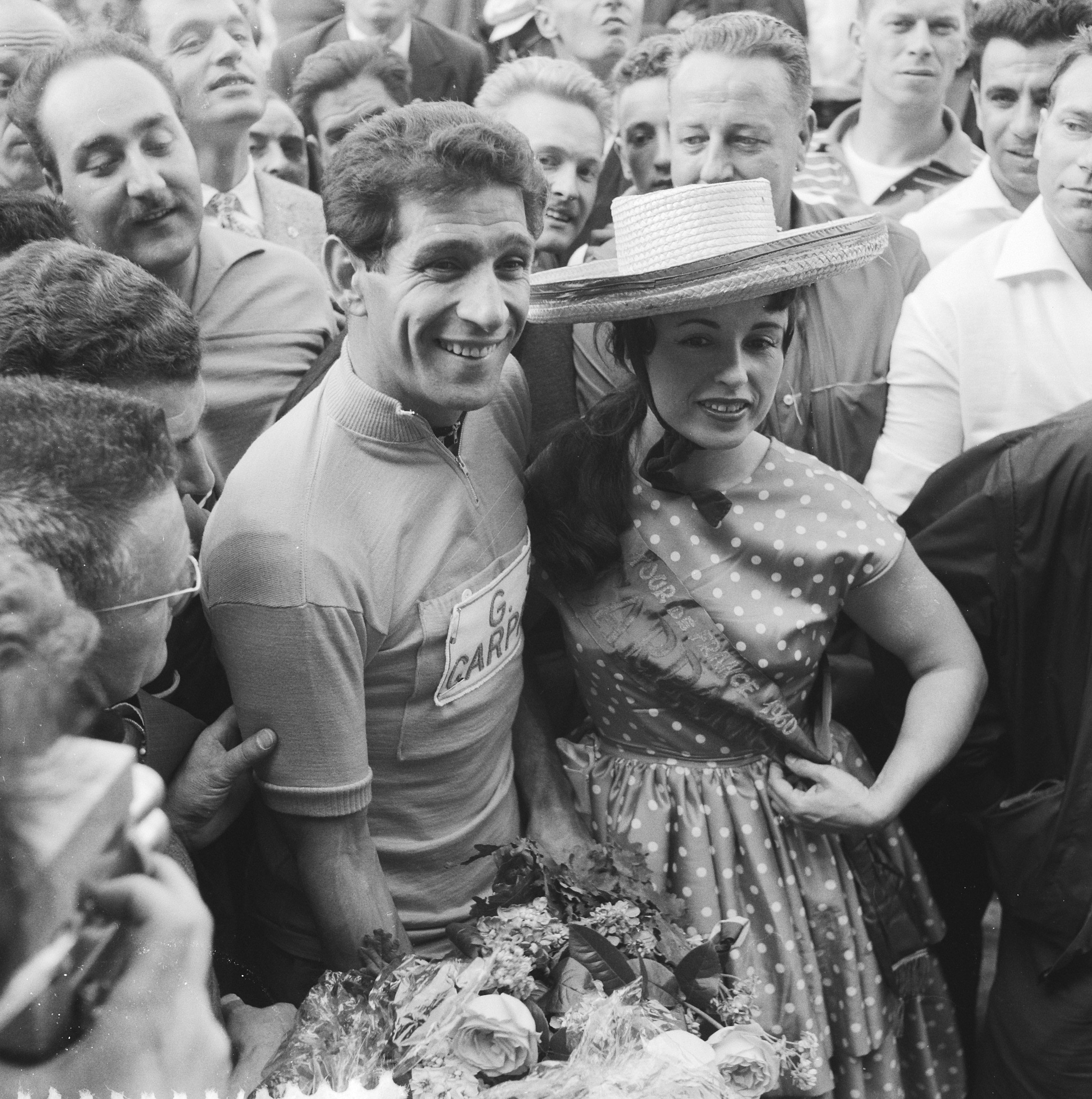 Collectie / Archief : Fotocollectie Anefo Reportage / Serie : [ onbekend ] Beschrijving : Tour de France , Nencini in gele trui Datum : 28 juni 1960 Trefwoorden : truien Fotograaf : Pot, Harry / Anefo Auteursrechthebbende : Nationaal Archief Materiaalsoort : Negatief (zwart/wit) Nummer archiefinventaris : bekijk toegang 2.24.01.03 Bestanddeelnummer : 911-3752